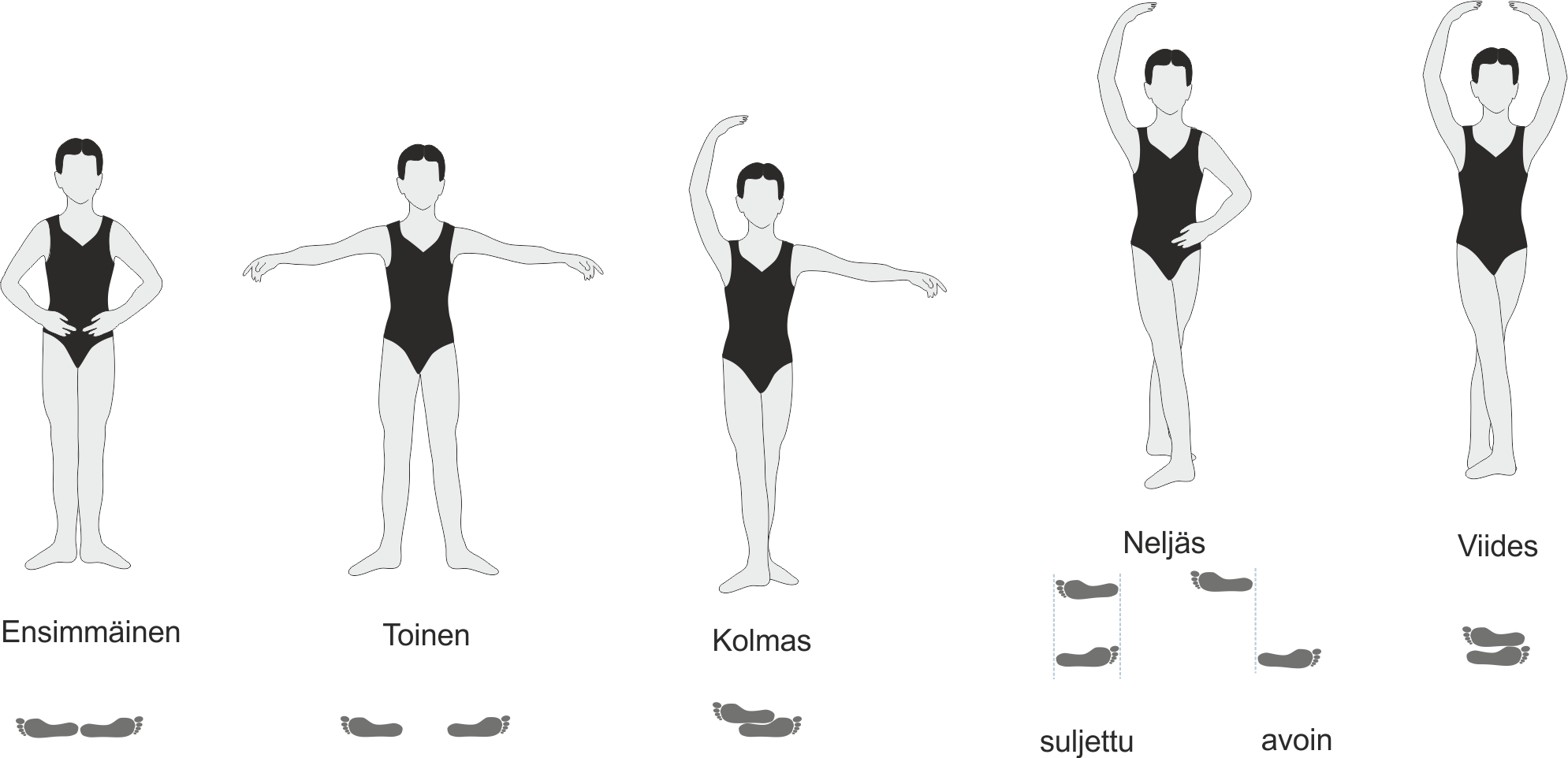 Baletin viisi asentoa